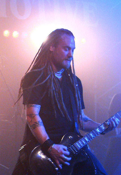 Dark Tranquillity, concert du 12/10/07 à la Locomotive à Paris. Martin Henriksson à la guitare.